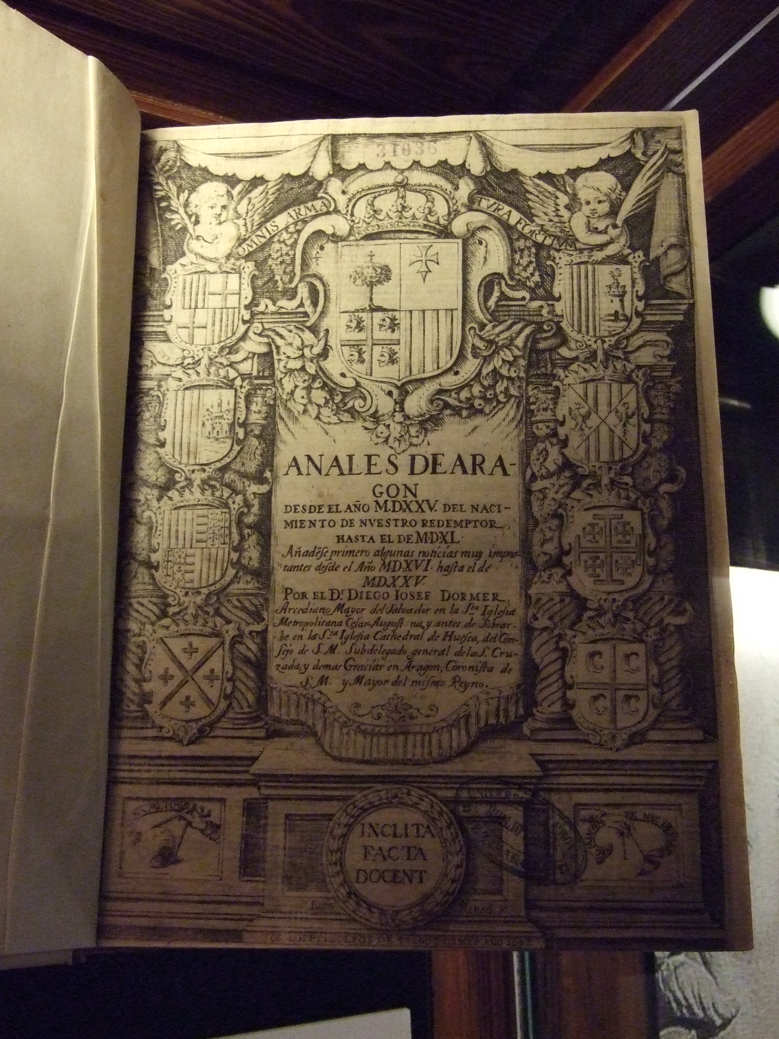 Dormer, Diego José (m. 1705) Anales de Aragon : desde el año MDXXV ... hasta el de MDXL : añad¯ese primero algunas noticias muy importantes desde ... MDXVI hasta ... MDXXV [1] [Zaragoza] : por los herederos de Diego Dormer, 1697